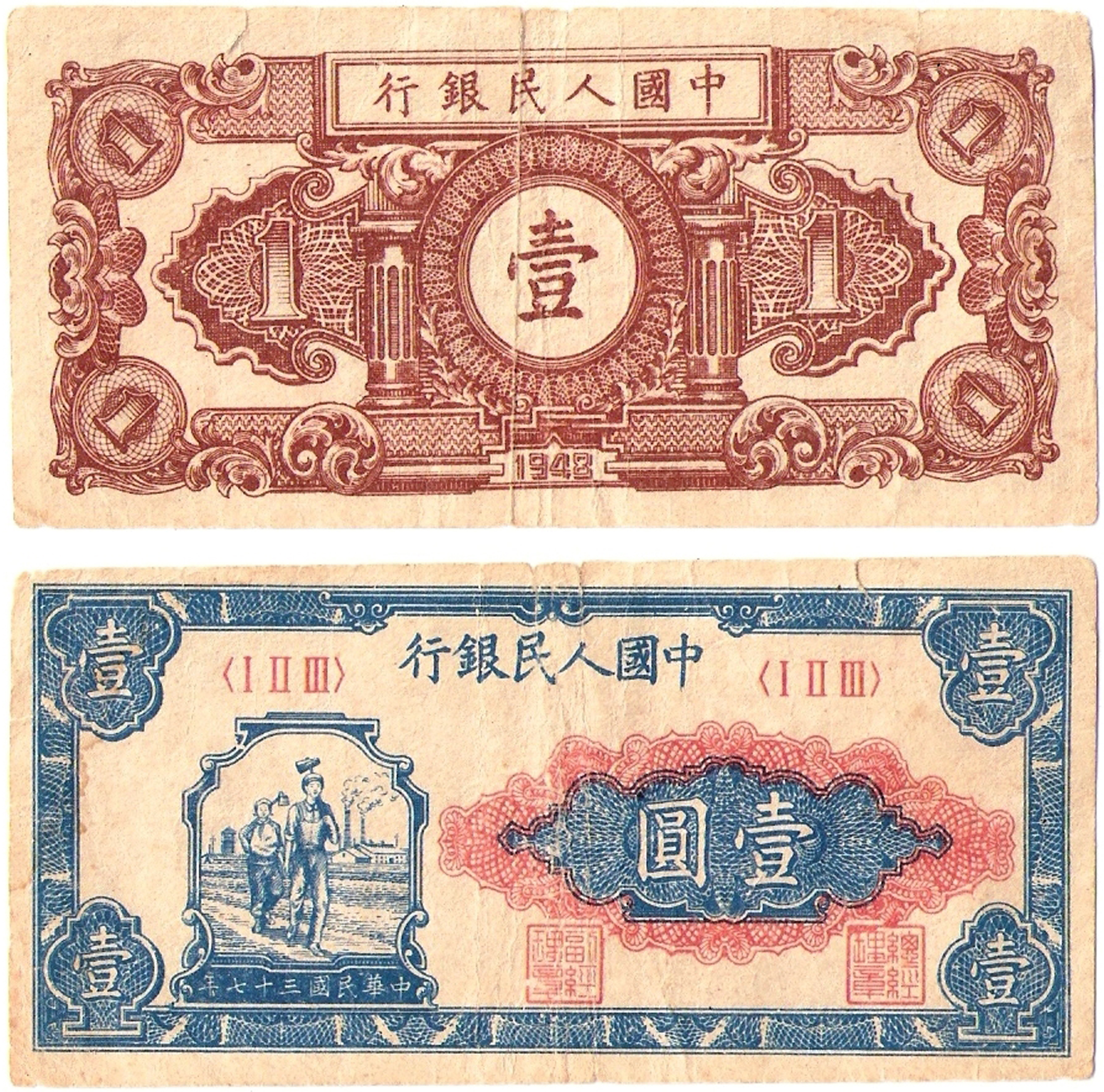 第一版人民币（RMB）1元，1948年发行。